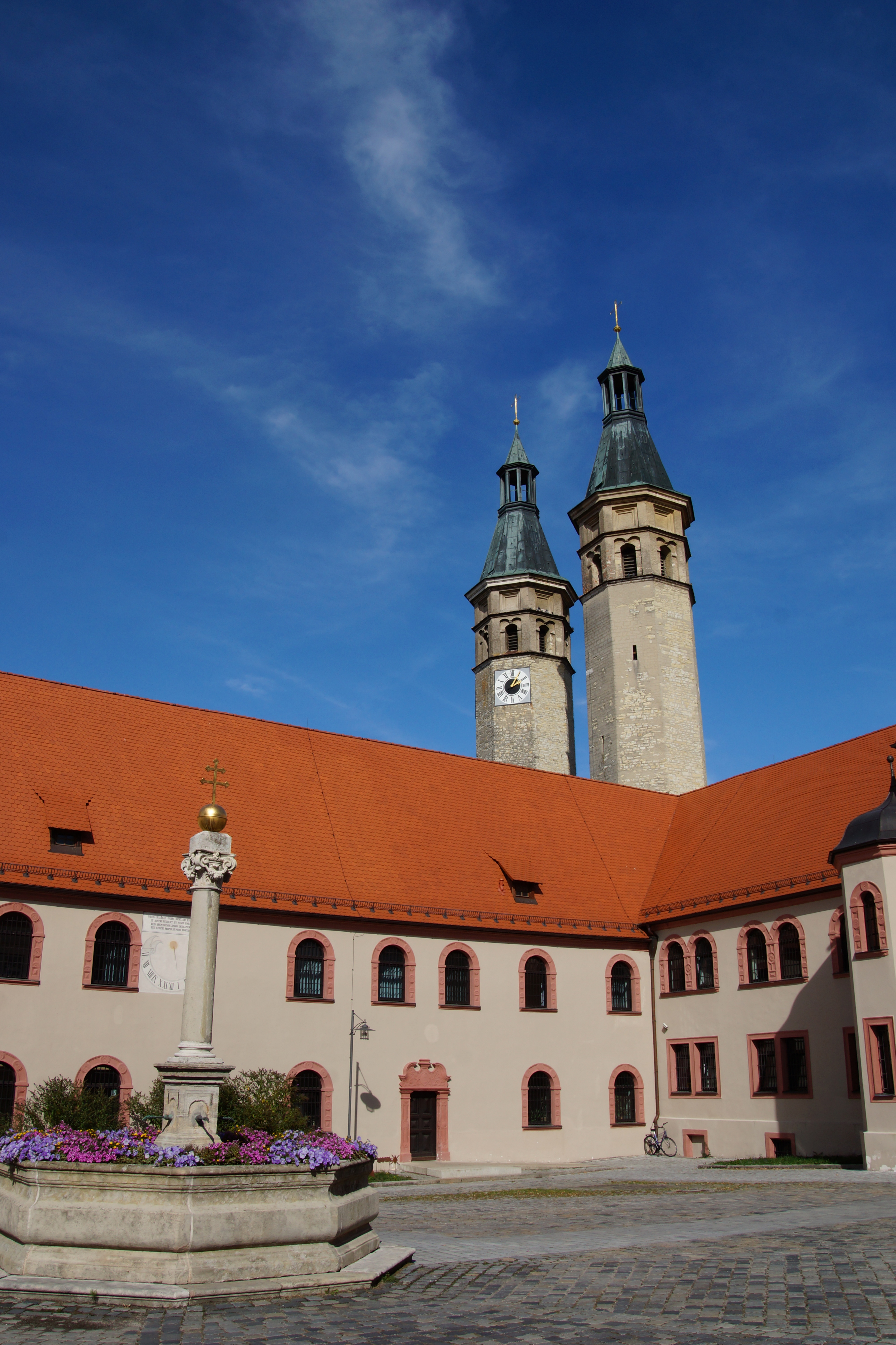 Das ehemalige Karthäuserkloster Prüll in Regensburg